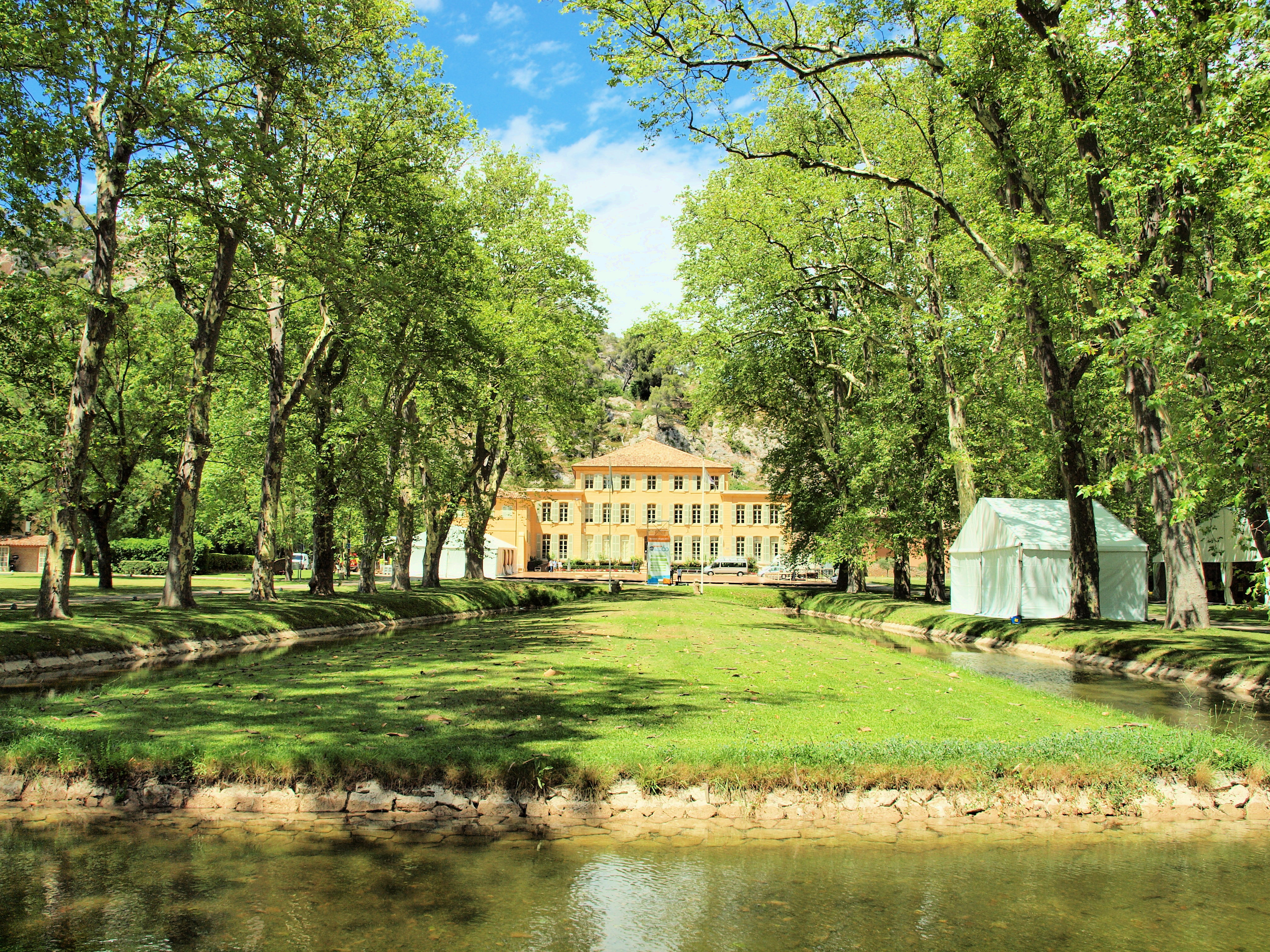 Château du Tholonet (Bouches-du-Rhône, France)